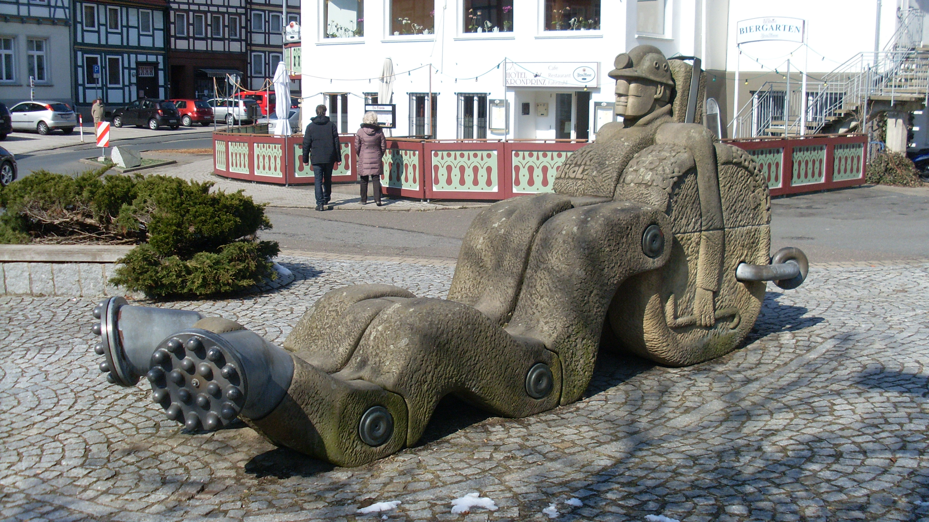 Skulptur "Soltmann" aus Sandstein, Stahl und Messing. Künstler: Otto Almstadt, Hans-Werner Kalkmann und Klaus Müller-Krug.